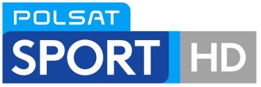 Logo Polsatu Sport HD